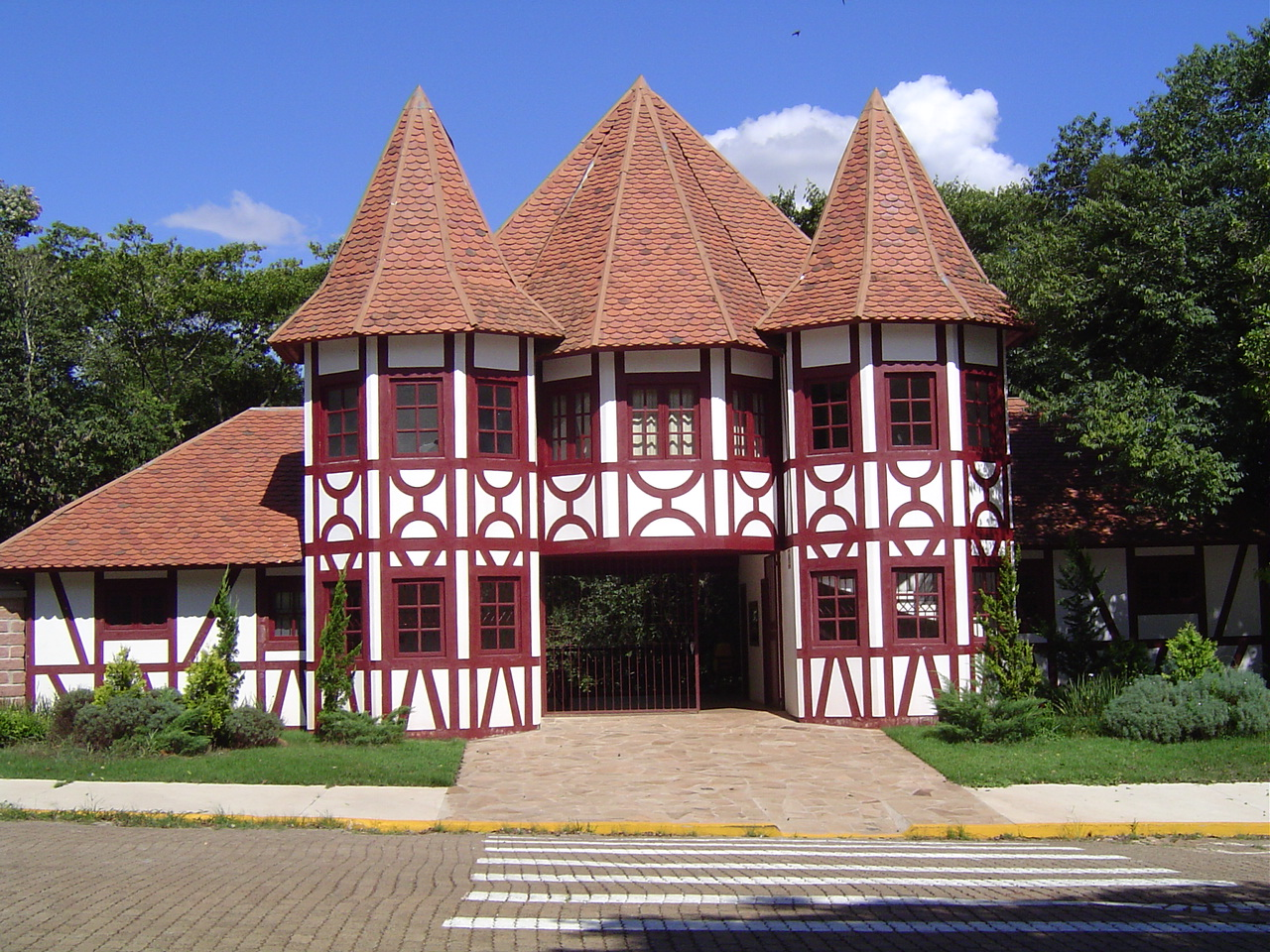 Parque histórico de Lajeado - RS "Deutscher Kolonie Park". Foto própria.